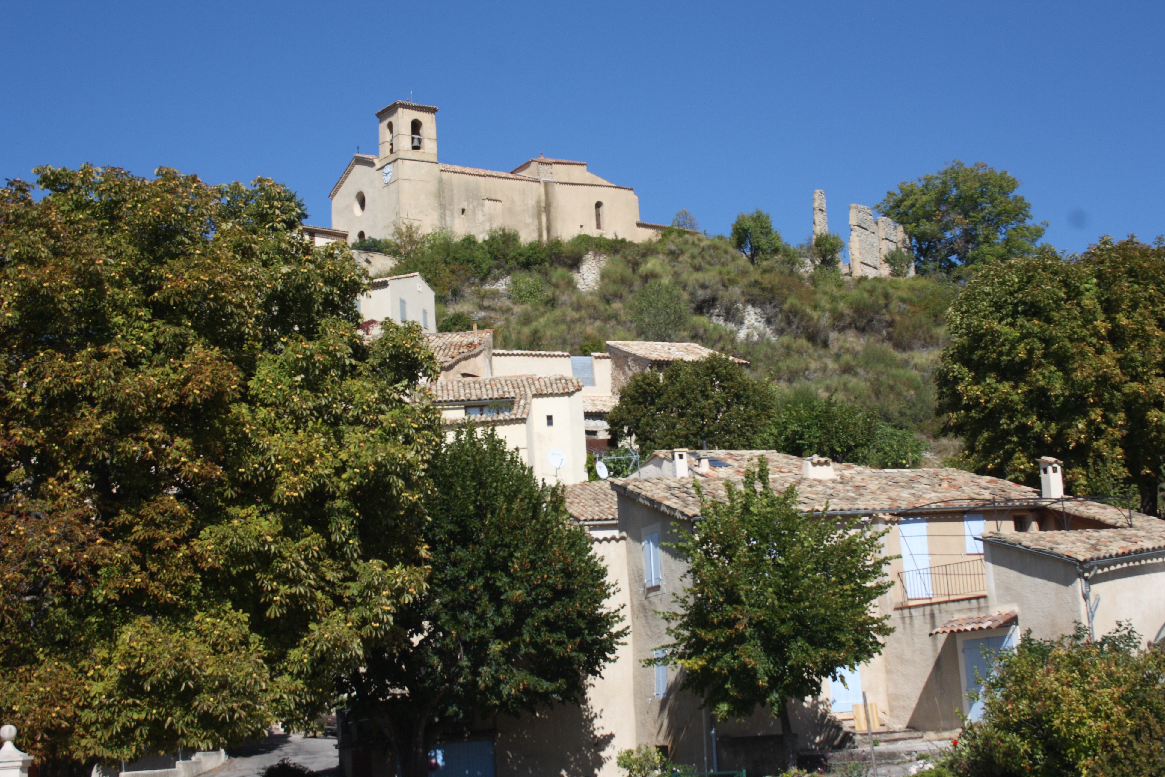 Saint-Jurs